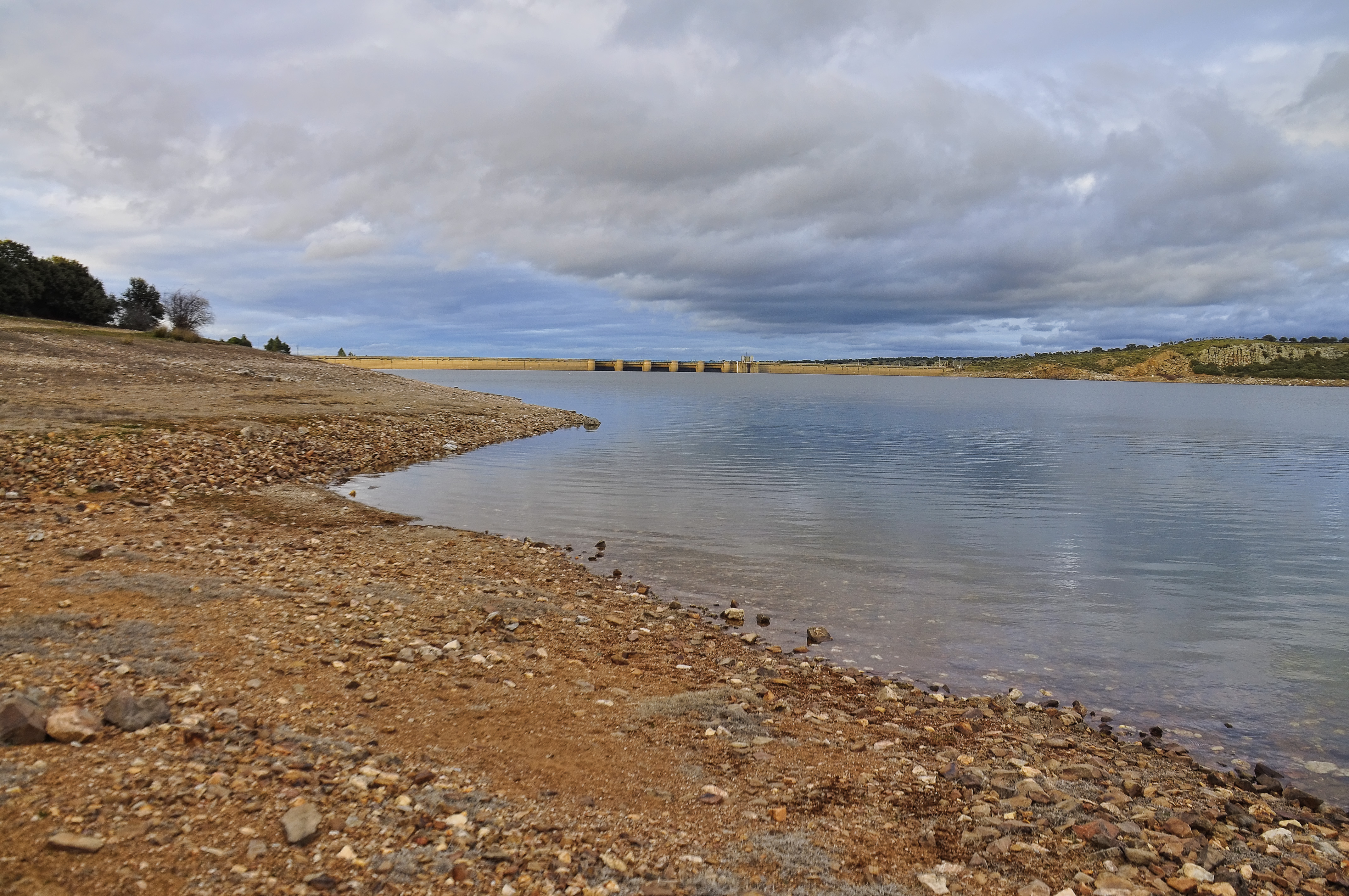 Pantano de Santa Teresa, provincia de Salamanca, Castilla y León, España.